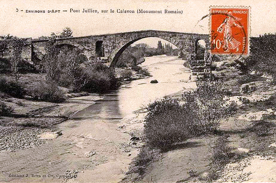 Le pont Julien au début du XXe siècle